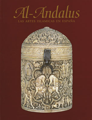 Portada del catalogo de la Exposición Al-andalus en el MET (1992), editado por El Viso Ediciones